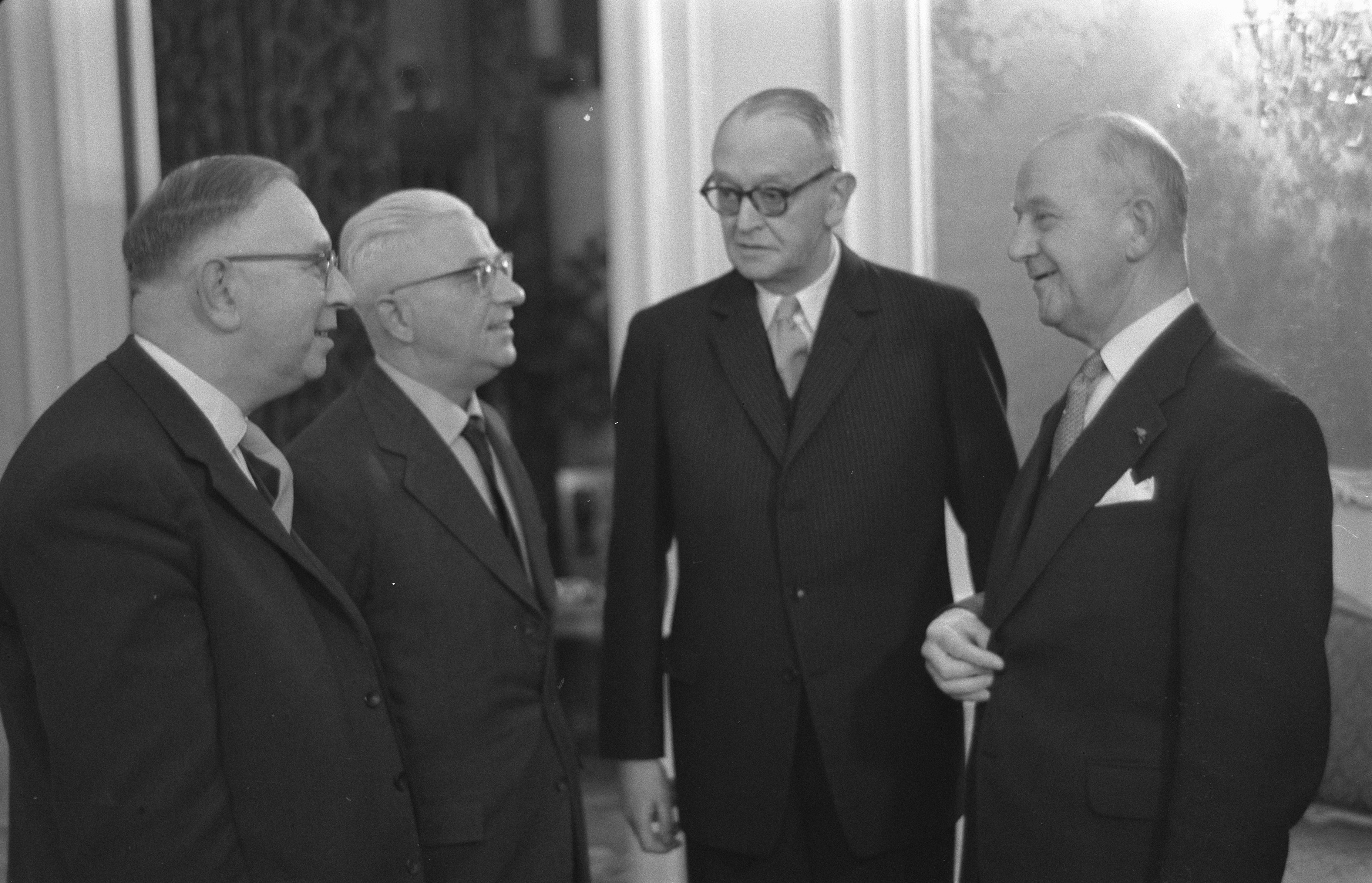 Collectie / Archief : Fotocollectie Anefo Reportage / Serie : [ onbekend ] Beschrijving : Uitreiking van de Constantijn Huygensprijs door de Jan Cam Stichting en de burgemeester van Den Haag mr. Kolfschoten Datum : 23 december 1959 Locatie : Den Haag, Zuid-Holland Trefwoorden : Uitreikingen, burgemeesters, prijzen Persoonsnaam : Constantijn Huygensprijs, Jan Cam Stichting Fotograaf : Pot, Harry / Anefo Auteursrechthebbende : Nationaal Archief Materiaalsoort : Negatief (zwart/wit) Nummer archiefinventaris : bekijk toegang 2.24.01.05 Bestanddeelnummer : 910-8953